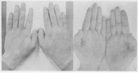 Brachydaktylie Typ D (verkürzter Daumen, beidseitig)